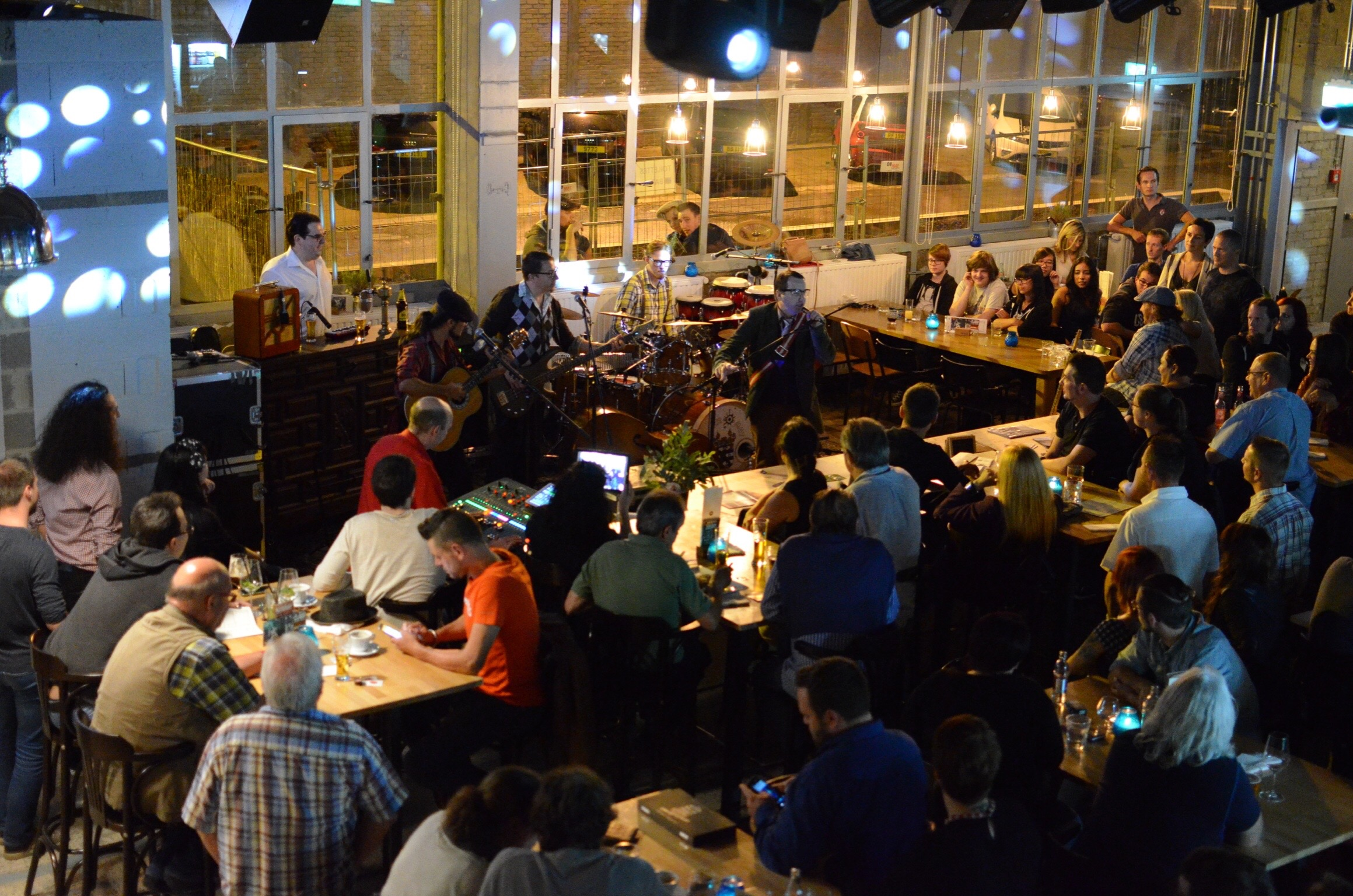 Concert vu Spack-O-Mat den 15.08.2015 zu Déifferdéng an der Schräinerei